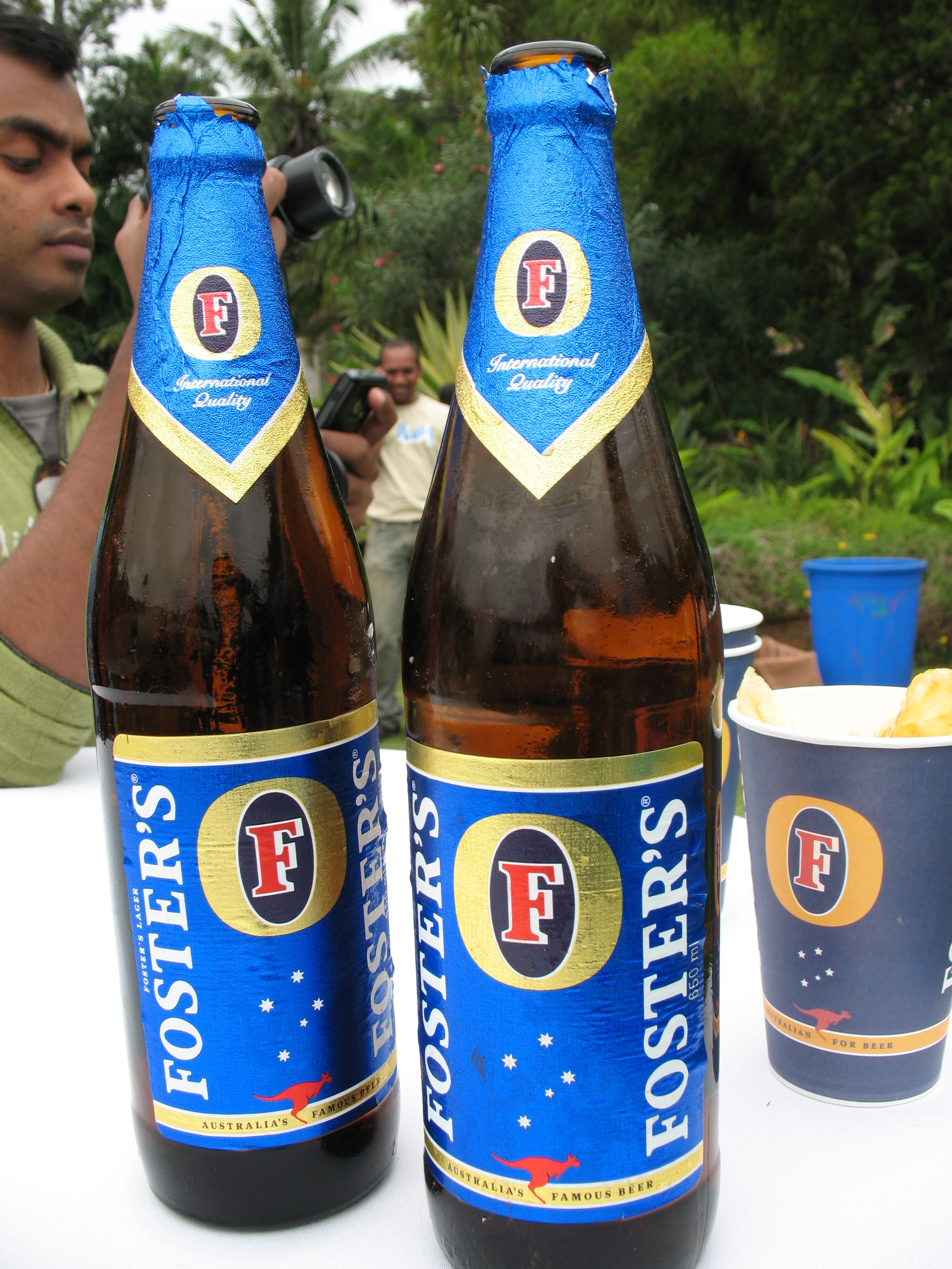 Beer bottles